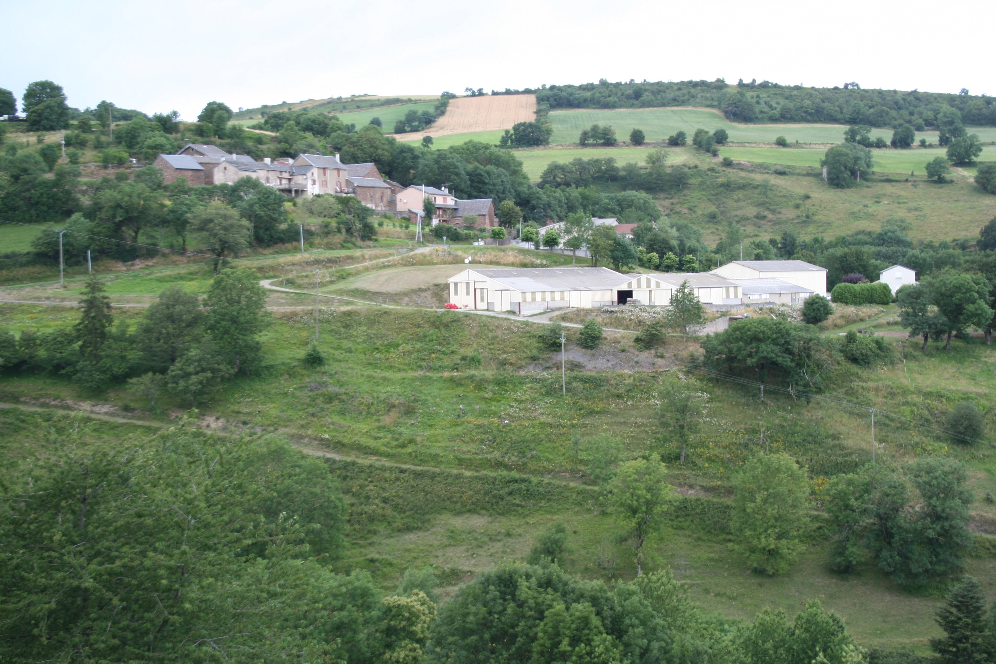 Mounes-Prohencoux (Aveyron) - hameau du Cros